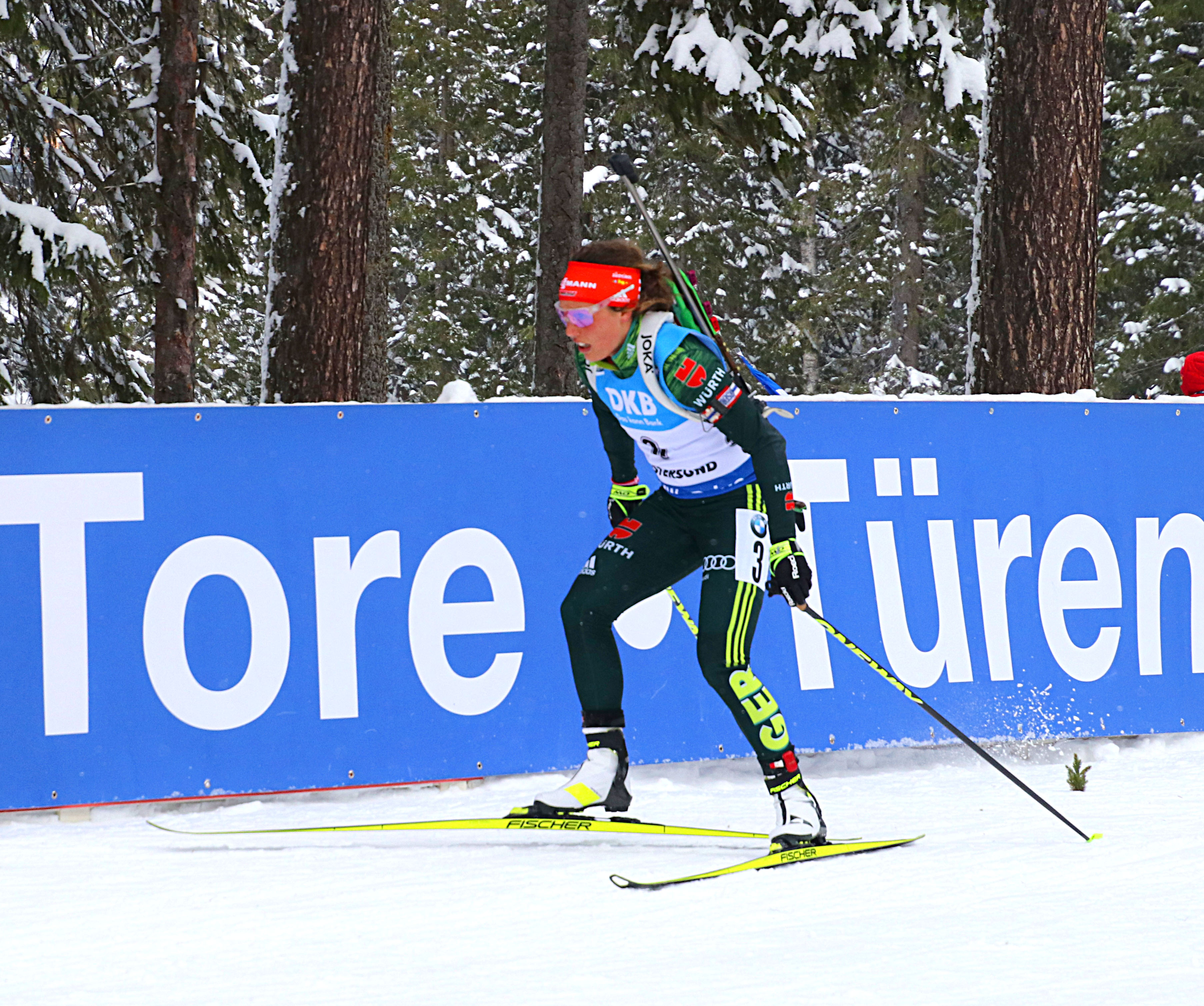 Östersund. Laura Dahlmeier på skidskytte-VM.